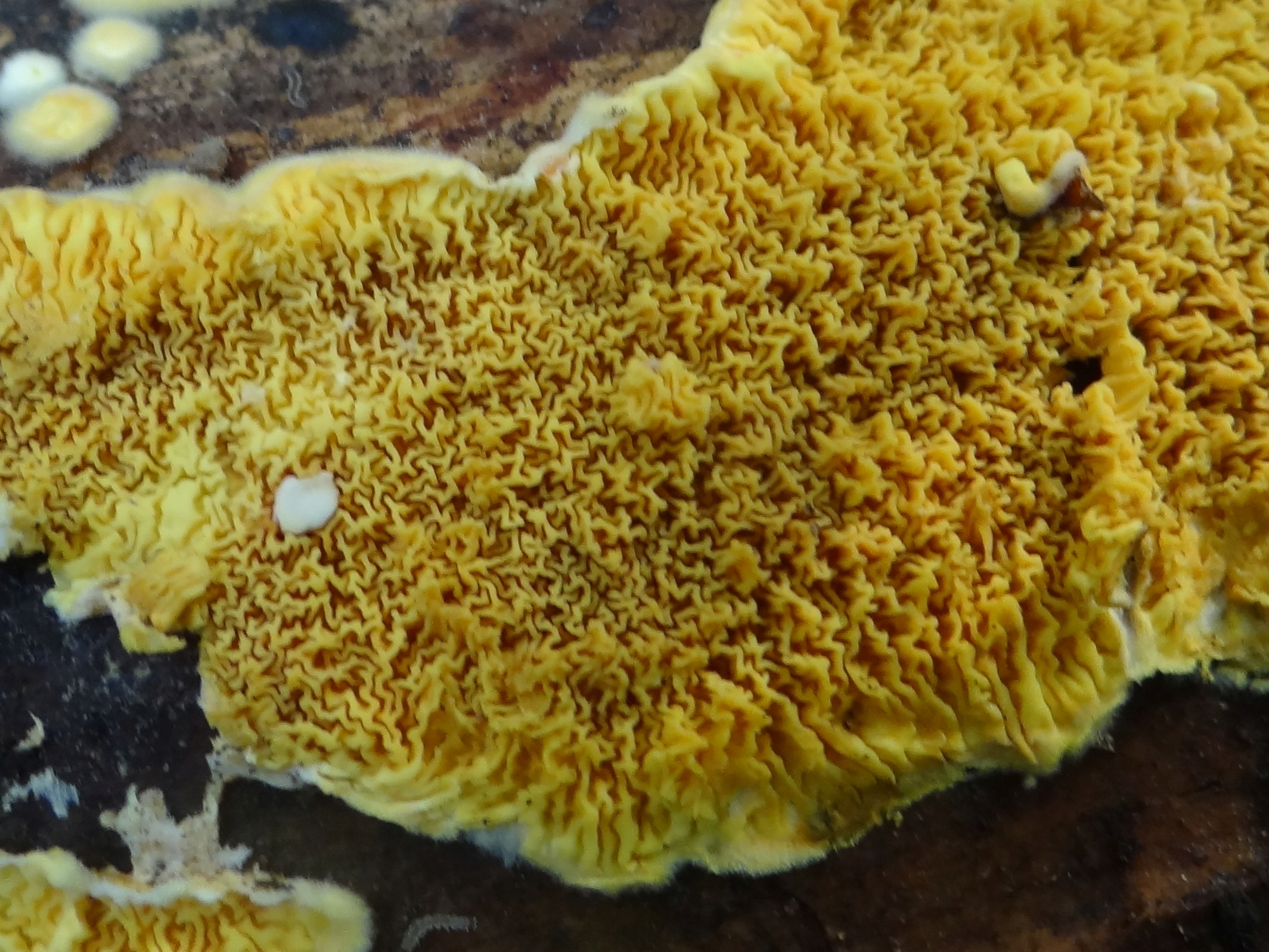 Pseudomerulius aureus on Pinus sylvestris/ Location: Poland, Puszcza Niepołomicka